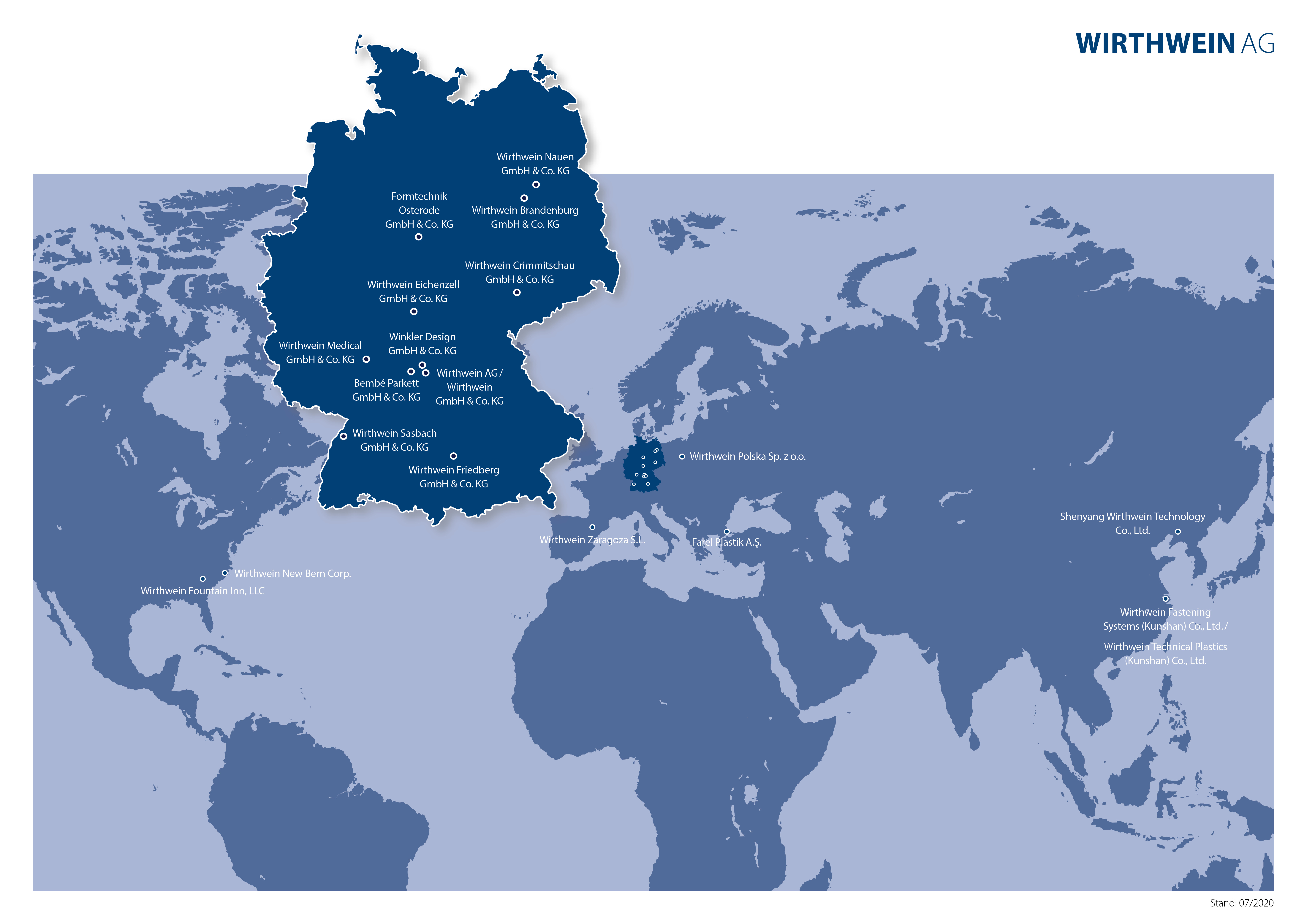 Weltkarte mit Unternehmen der Wirthwein-Gruppe